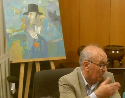 Marcial Gómez Parejo 2003